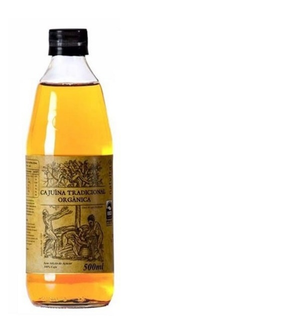 Cajuína orgânica clarificada por processo de ultrafiltração, sem uso de gelatina ou cola de origem animal.